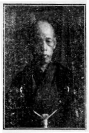 田 艇吉（でん ていきち）